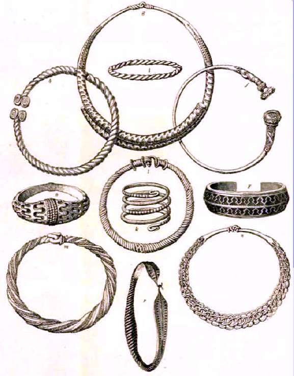 Inele si colane din aur si argint.